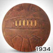 balon mundial 1934